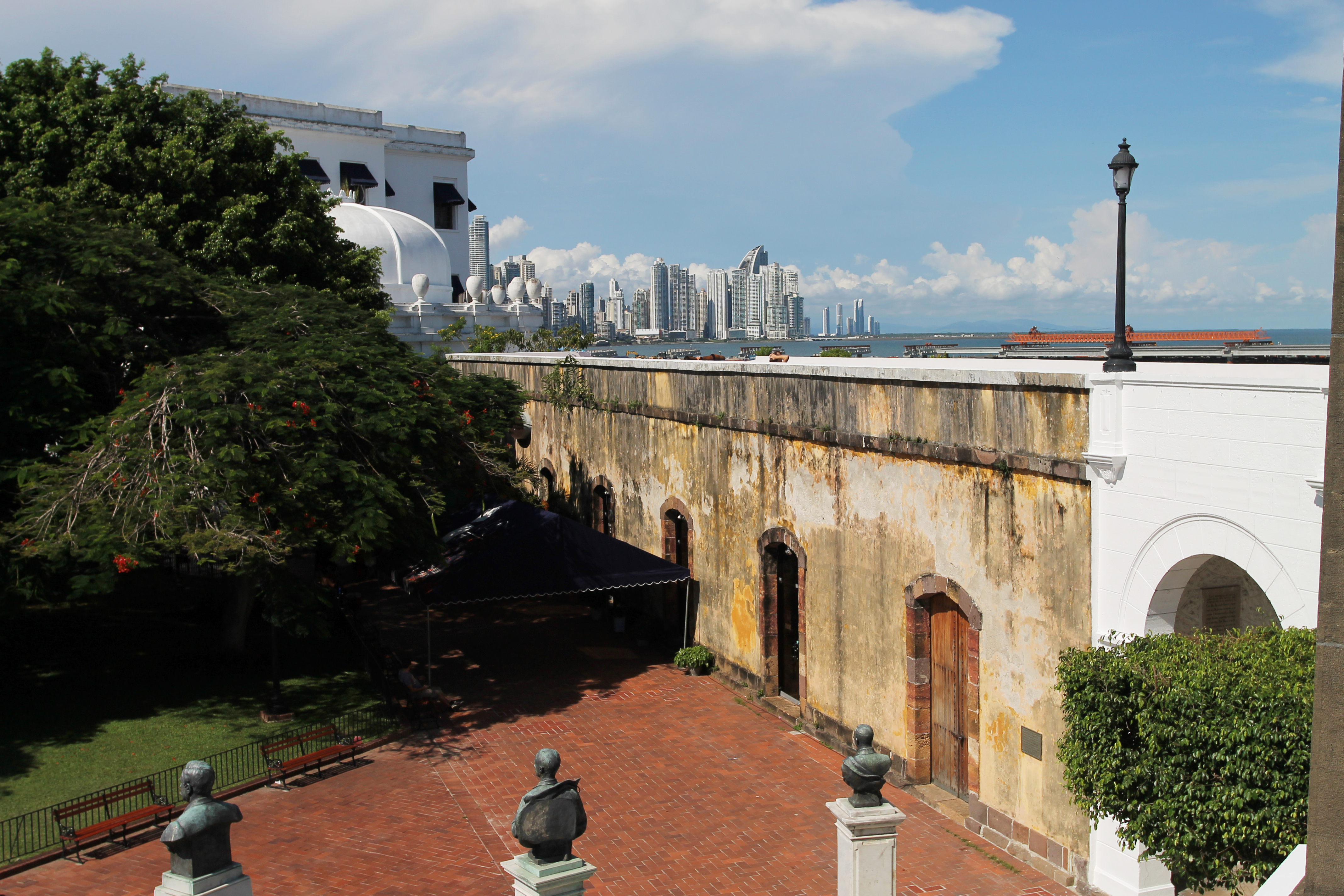 Muralla de las Bóvedas, Plaza de Francia.